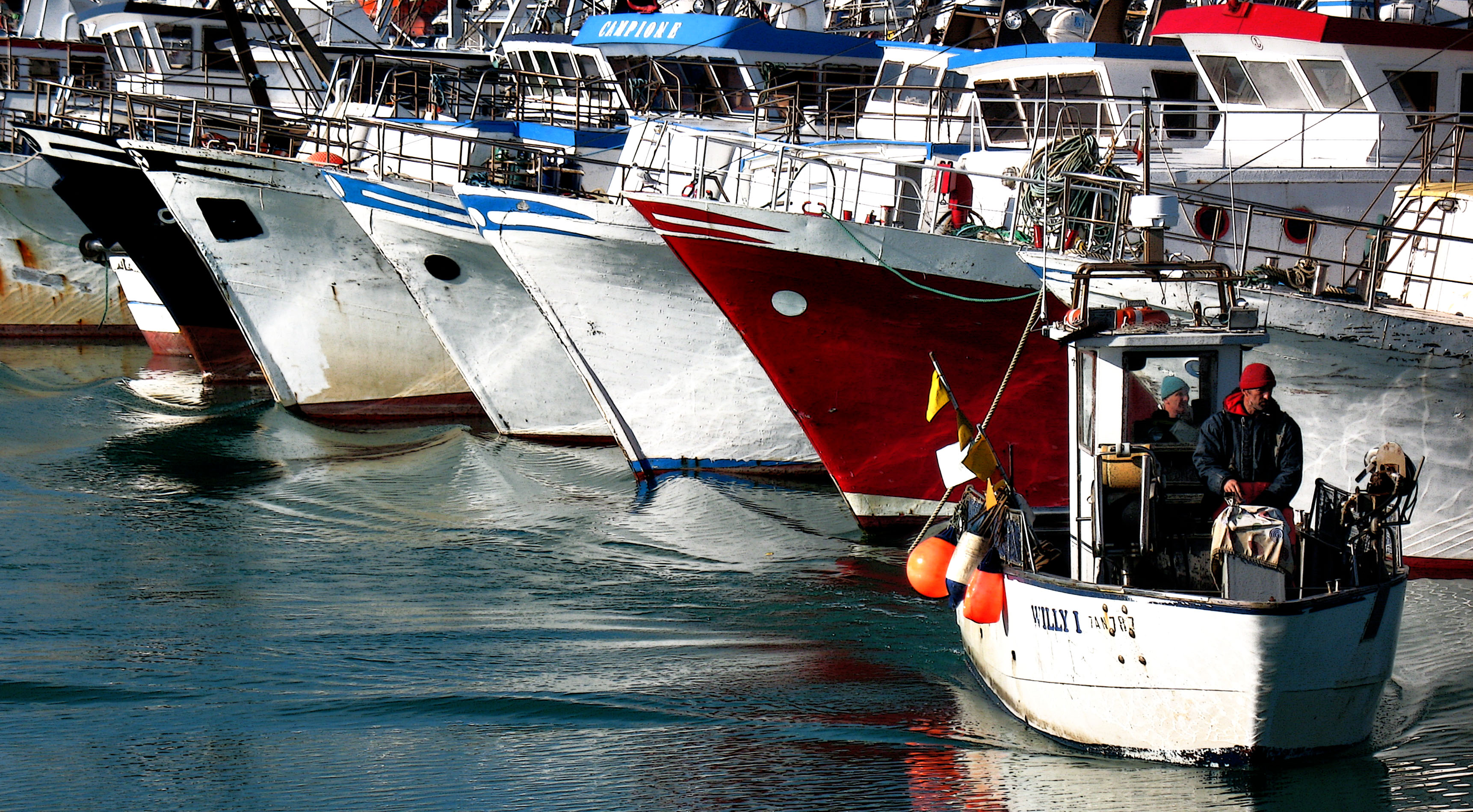 Civitanova marche: il porto, pescherecci ormeggiati.